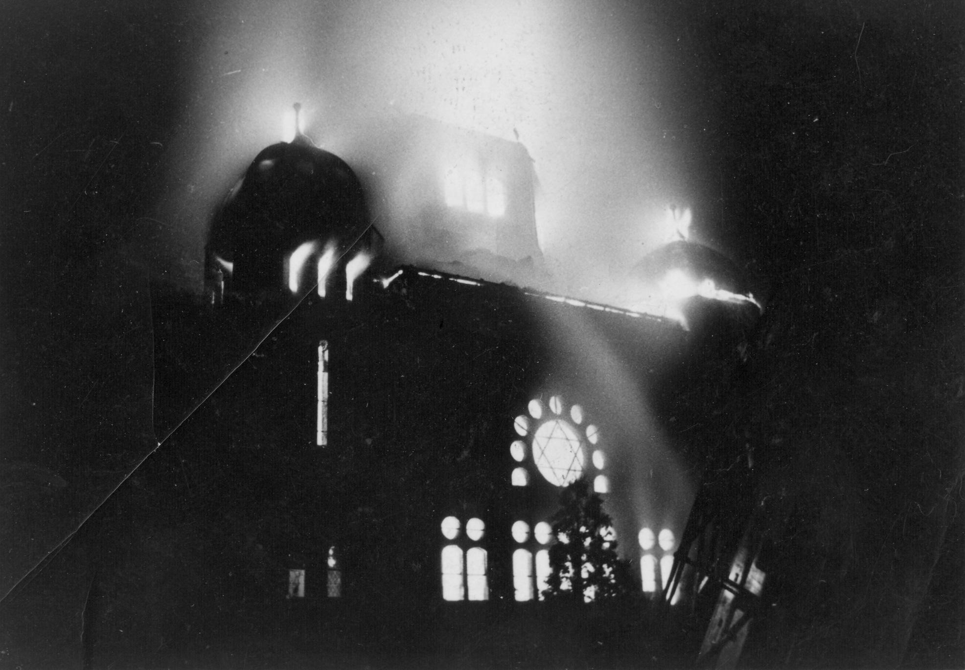 Brand der neuen Synagoge in Oppeln während der Reichskristallnacht